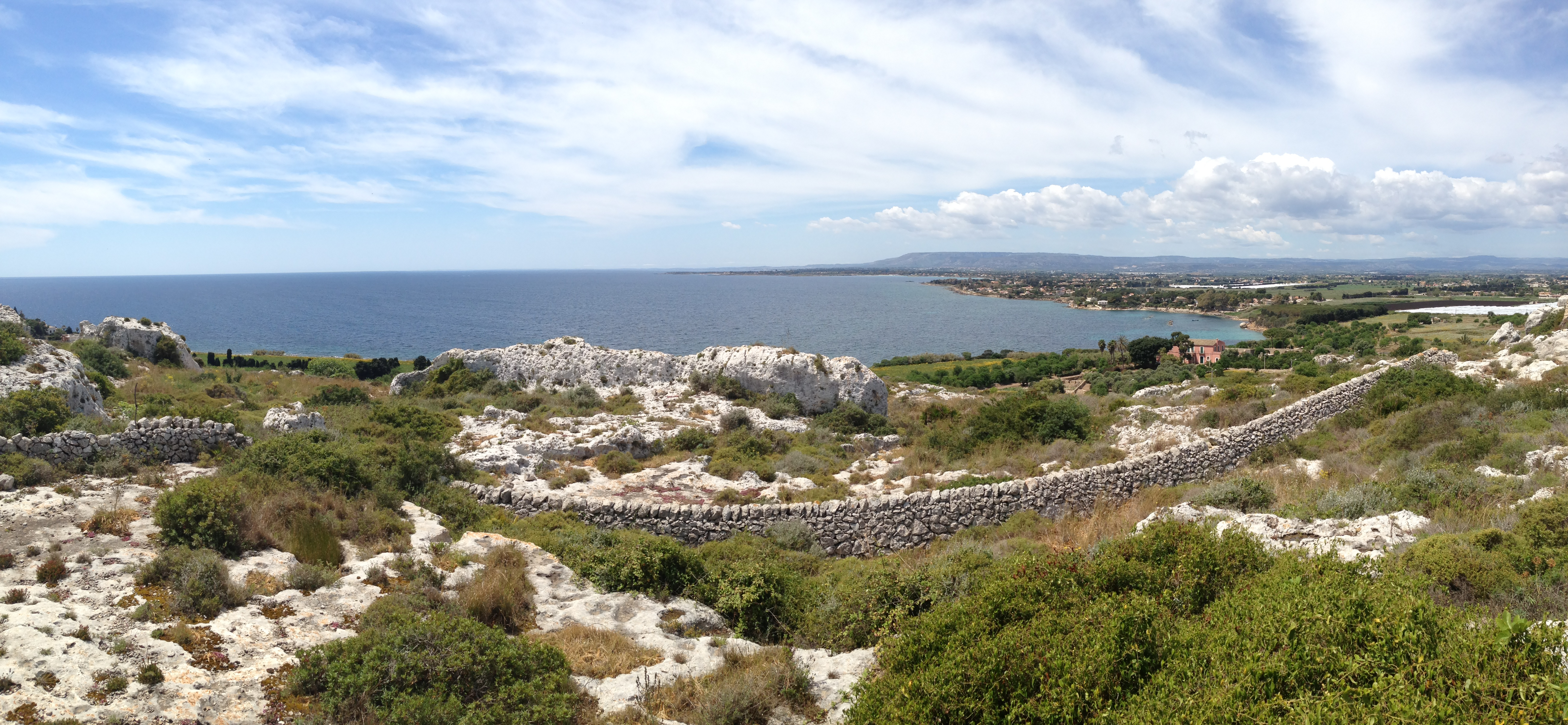 Litorale ovest del Plemmirio con l'abitato di Terrauzza